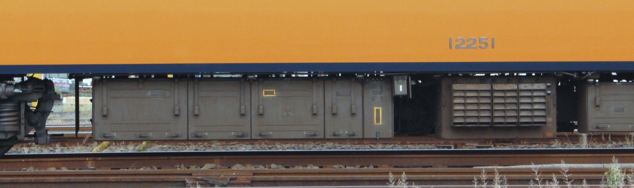 12200系 主制御装置